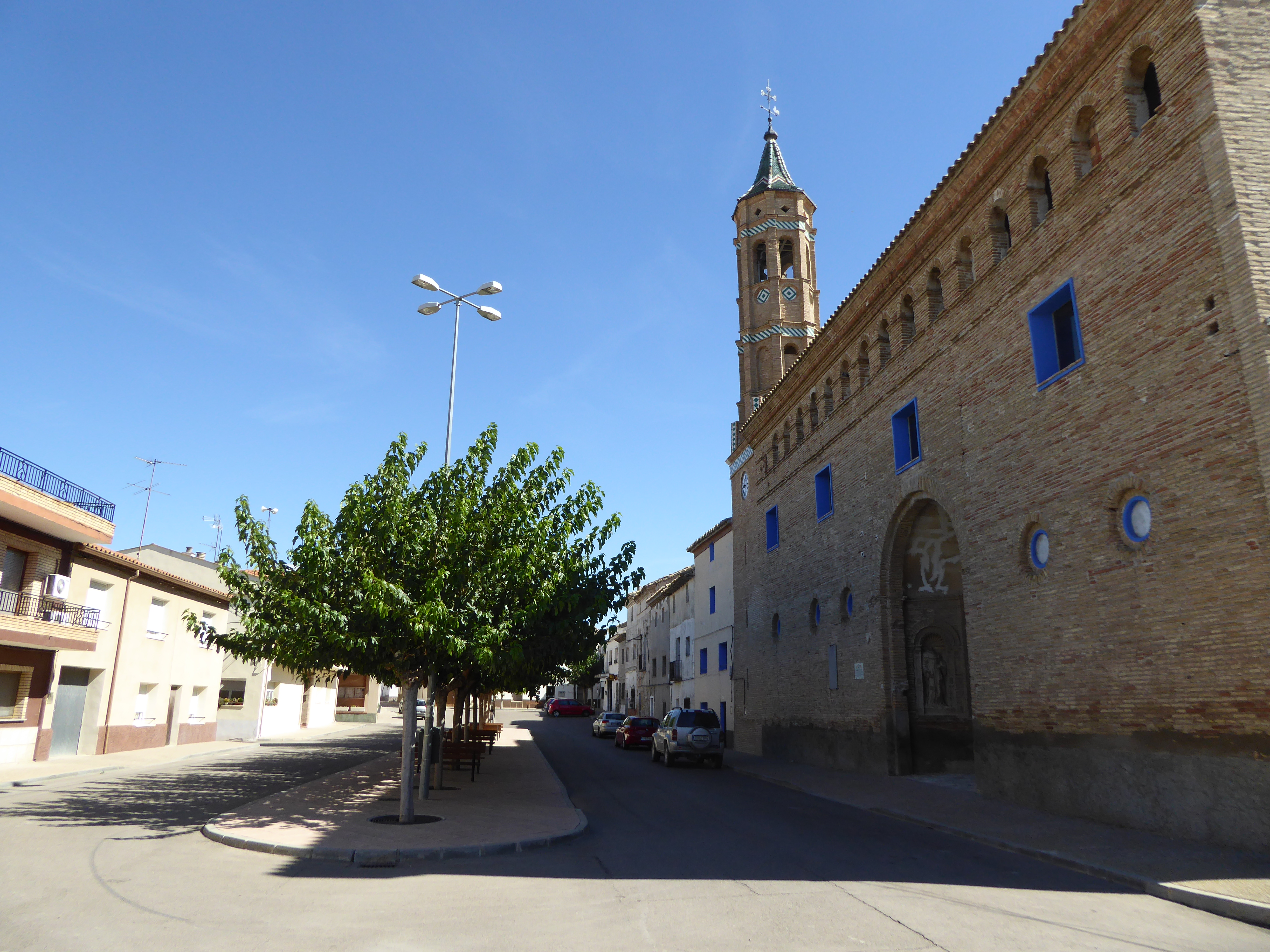 Iglesia de Santa Engracia en Osea de Ebro